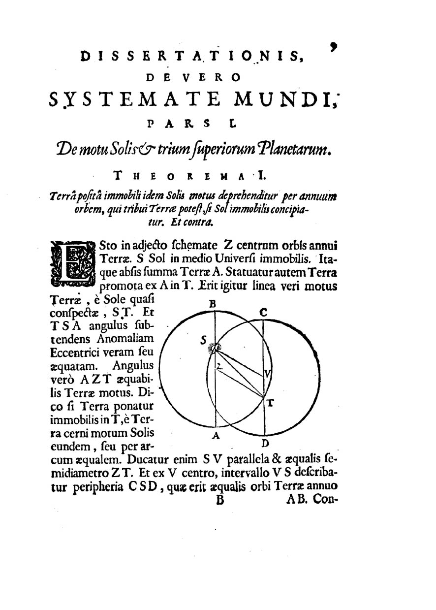 Antonii Deusingii med. ac philos. De vero systemate mundi dissertatio mathematica. Qua Copernici systema mundi reformatur: sublatis interim infinitis pene orbibus, quibus in systemate Ptolemaico humana mens distrahitur. - Amstelodami : apud Ludovicum Elzevirium, 1643. - [8], 173, [3] p. : ill. ; 4º .